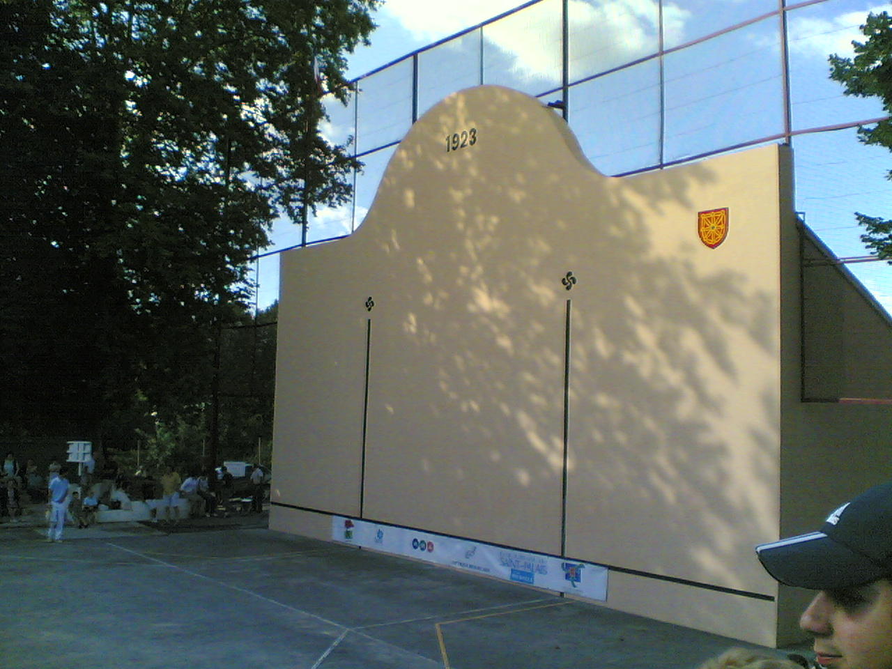 Fronton Saint-Palais Août 2007. / Donapaleuko pilotalekua 2007